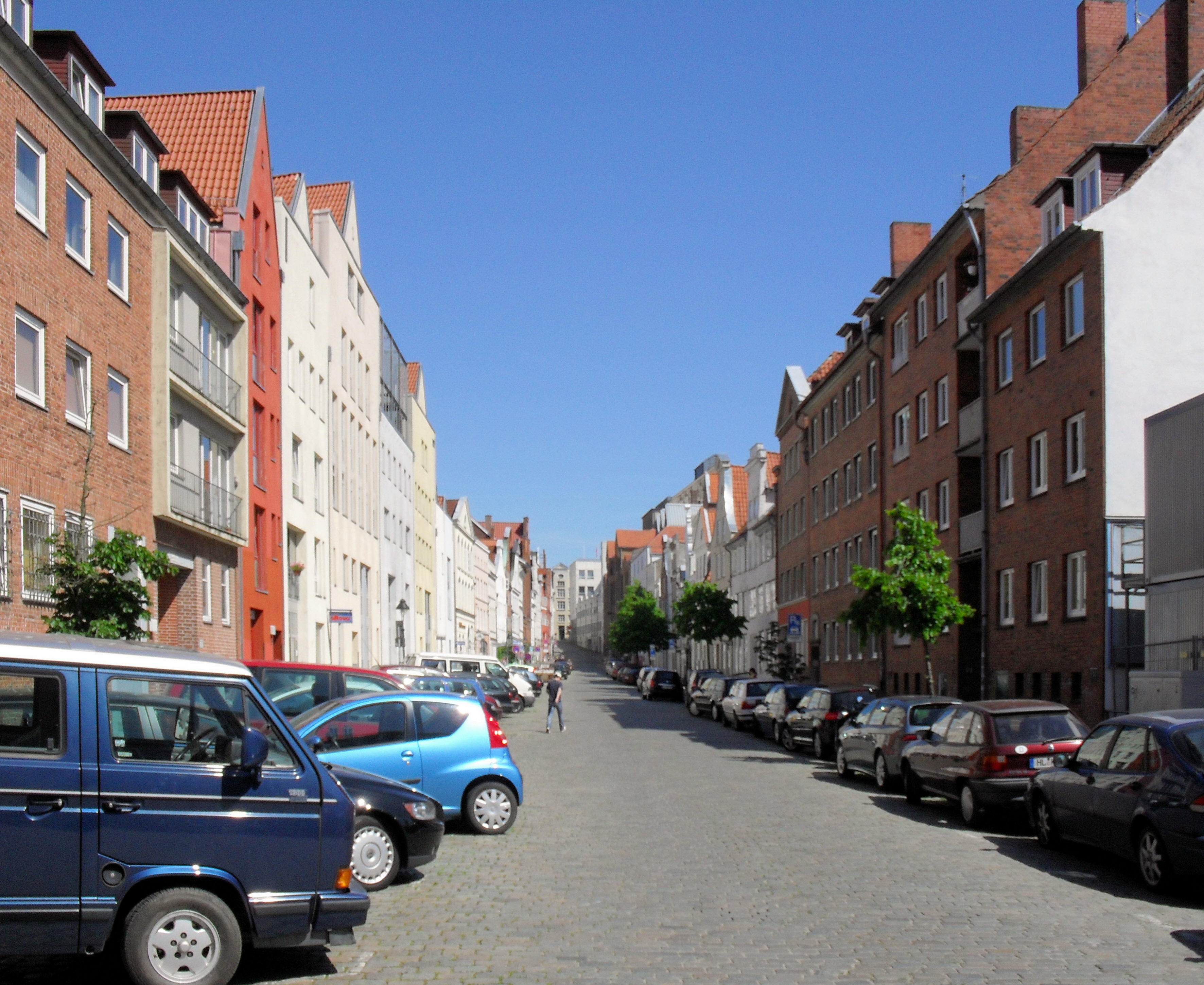 Die Fischergrube in Lübeck